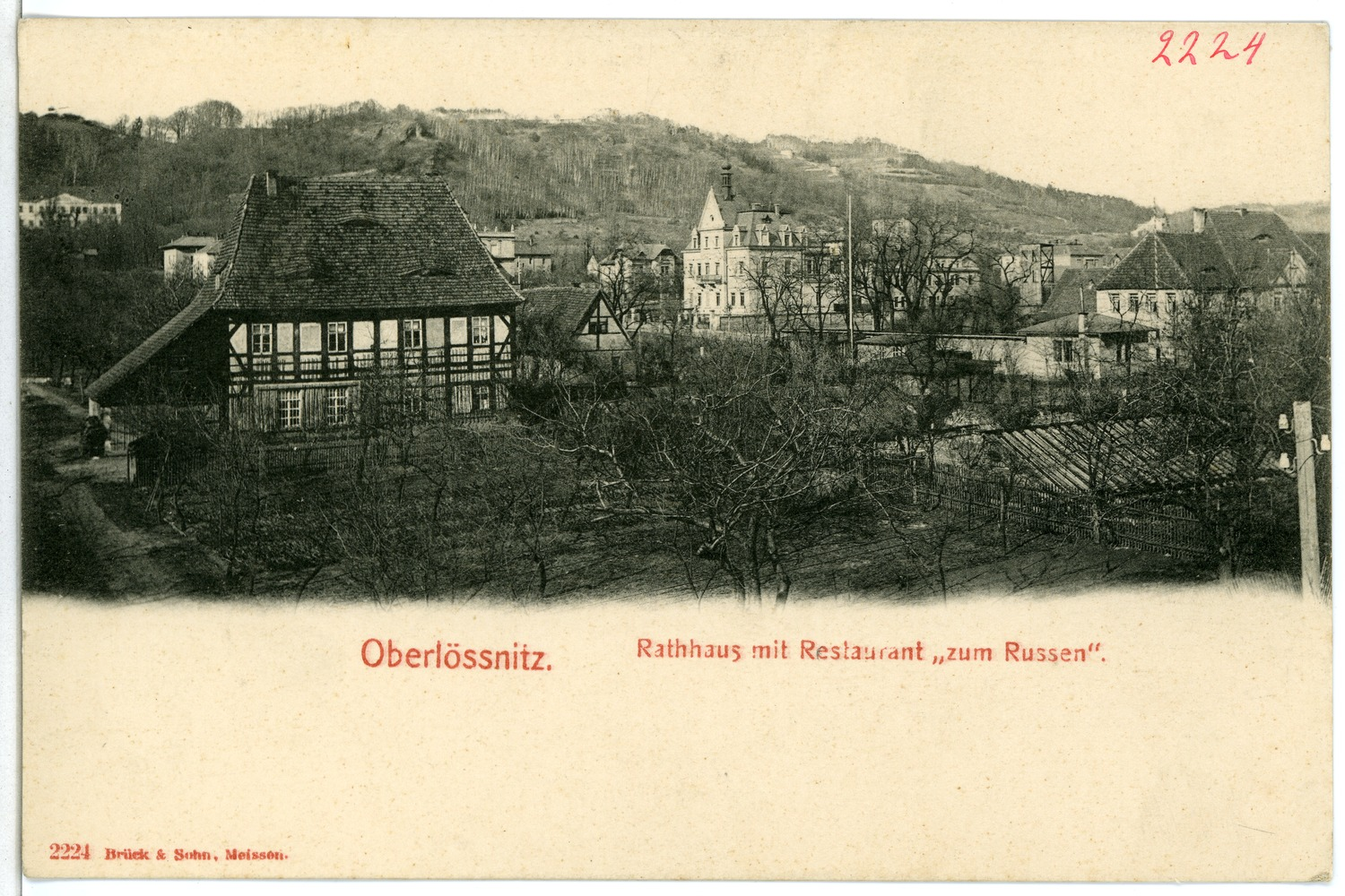 Oberlößnitz; Rathaus und Restaurant "zum Russen" This postcard is from publisher Brück & Sohn in Meißen ( postcard has a unique number 02224 and is available in a higher resolution at the publisher. This images was uploaded in a cooperation project between Wikipedians and the publisher.